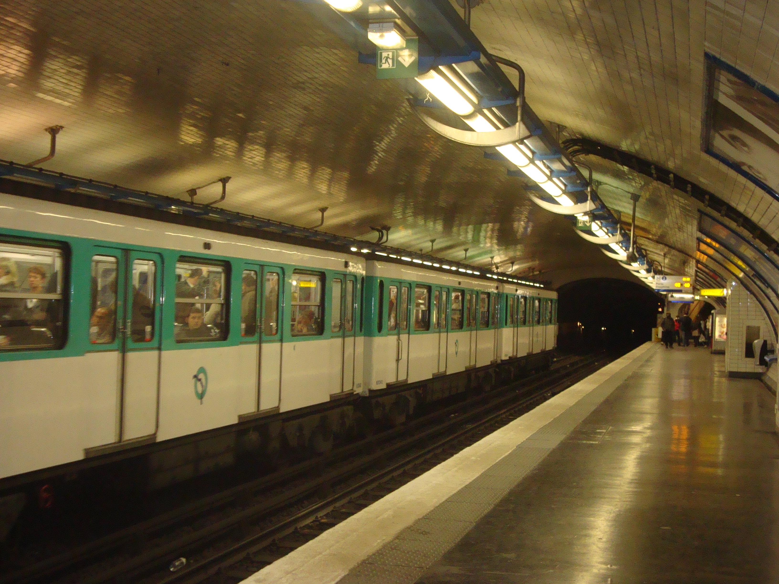 Quai de la station Pigalle sur la ligne 2 avec rame à l'arrêt.